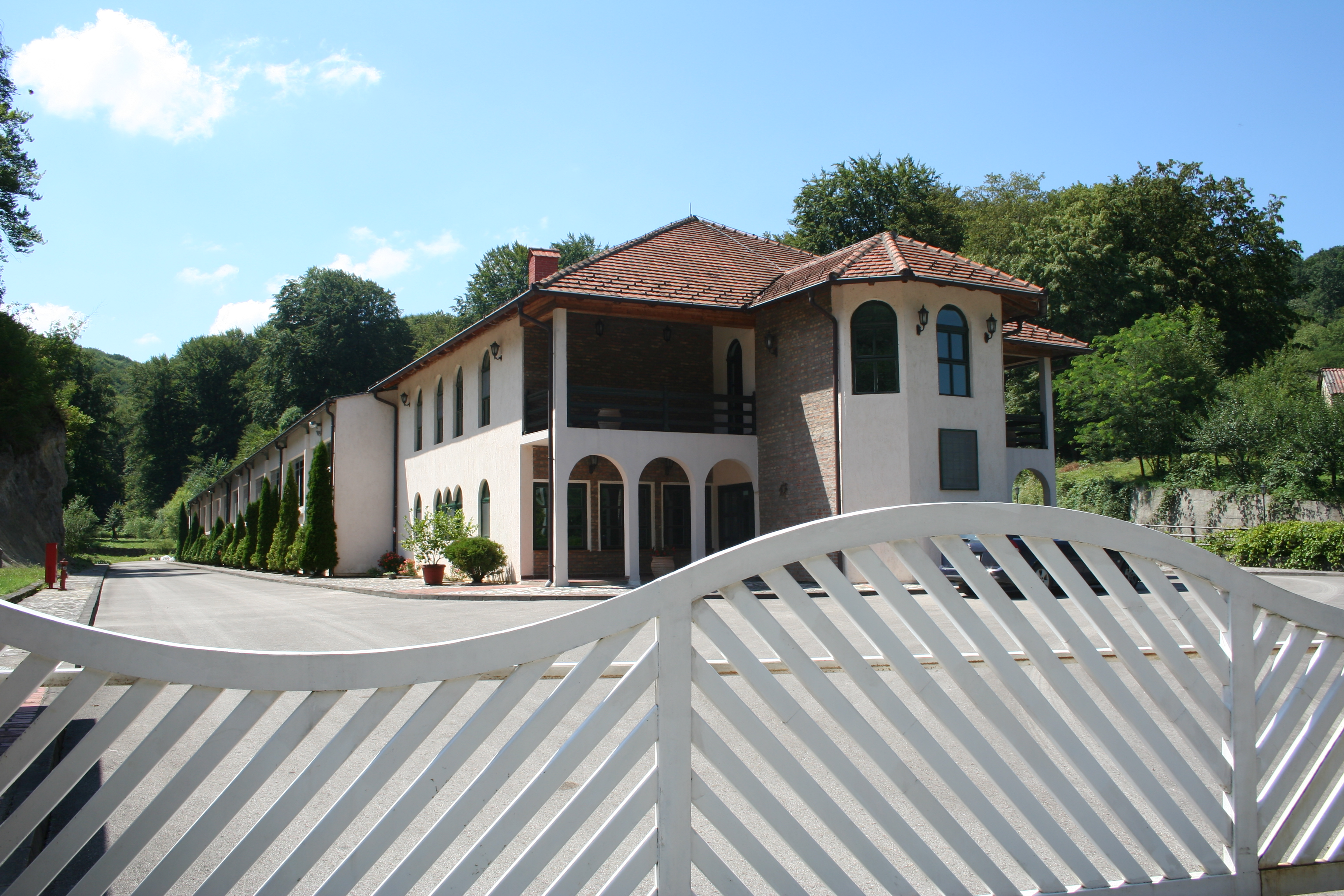 Tronoša voda, Korenita